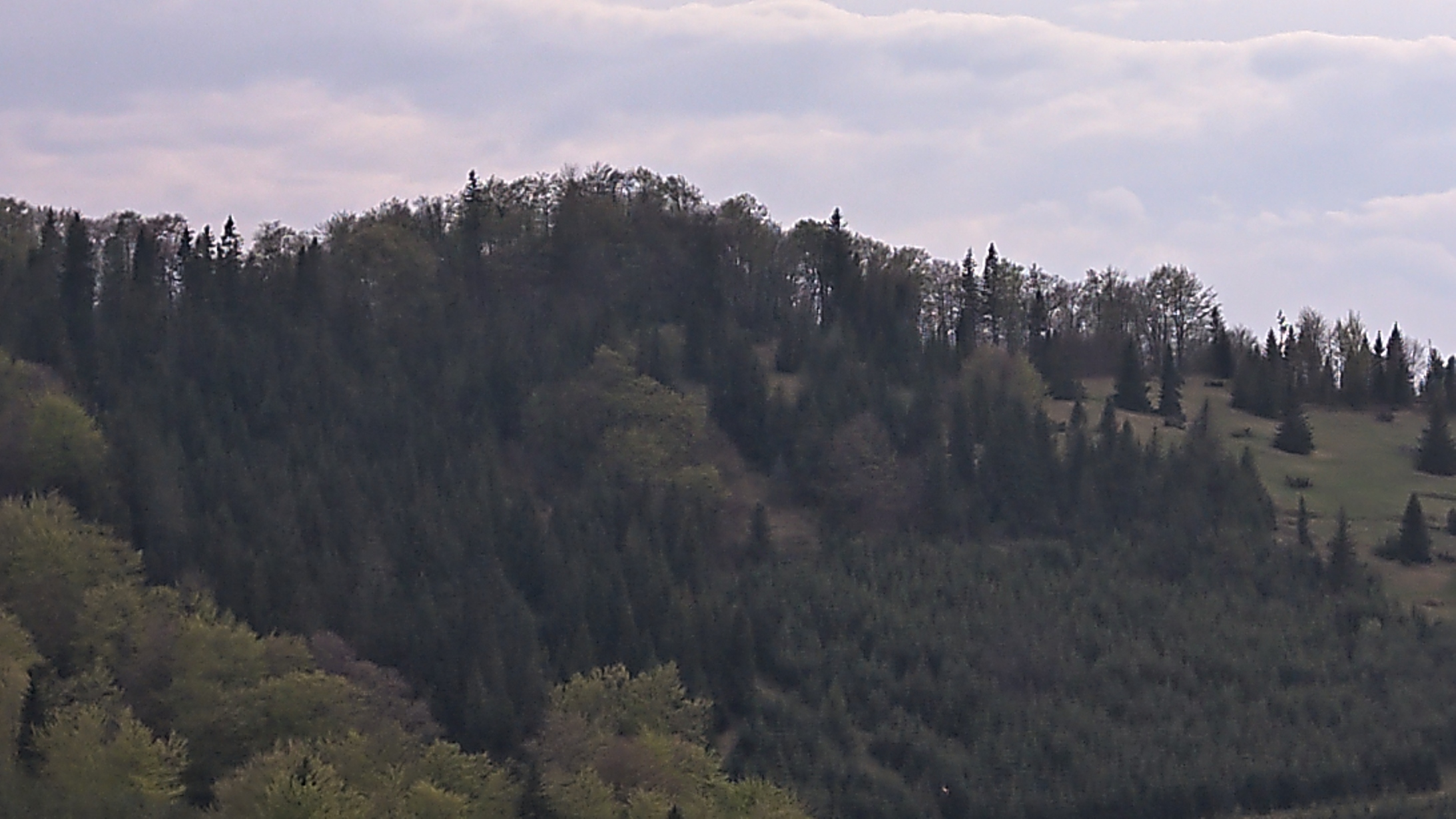 Widok spod Watriska na Jaworzynę (1001) w Małych Pieninach